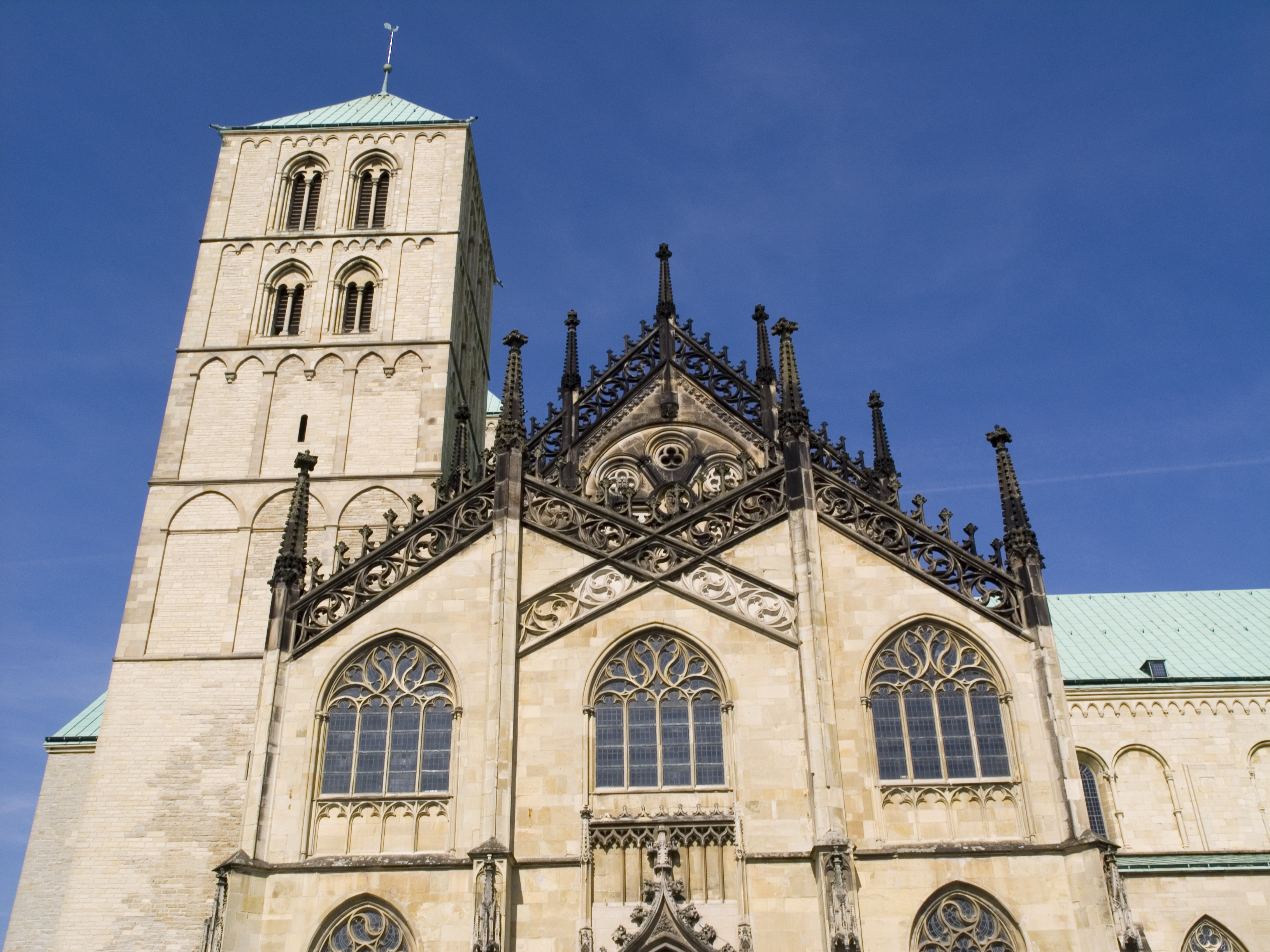 Северный Рейн - Вестфалия, Мюнстер - собор Святого Павла